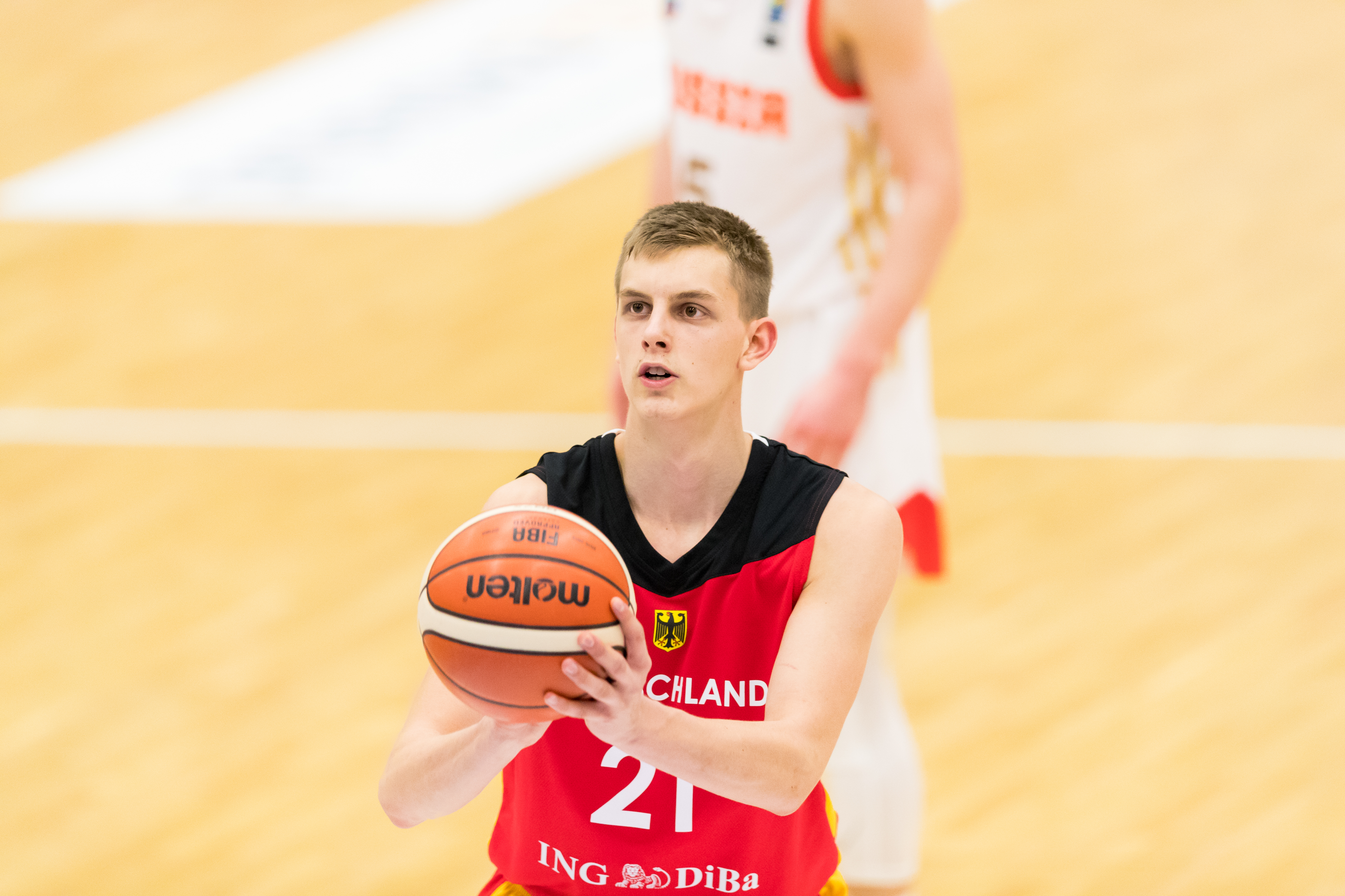 Germany vs Russia 80:75 during semi-final Basketball Albert Schweitzer Turnier at GBG Halle, Mannheim, Baden-Württemberg, Germany on 2018-04-06, Photo: Sven Mandel